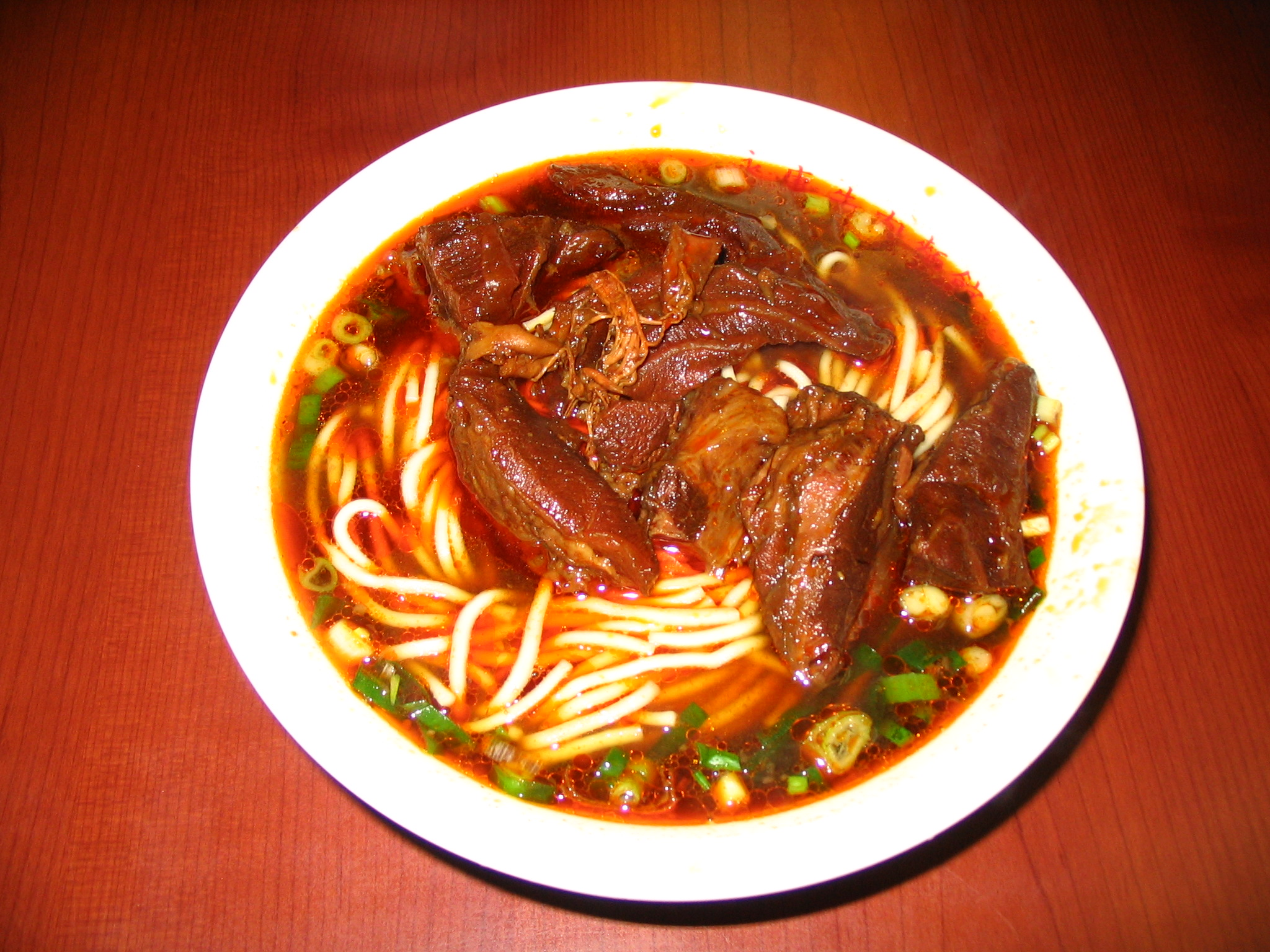 臺北市永康街牛肉麵。